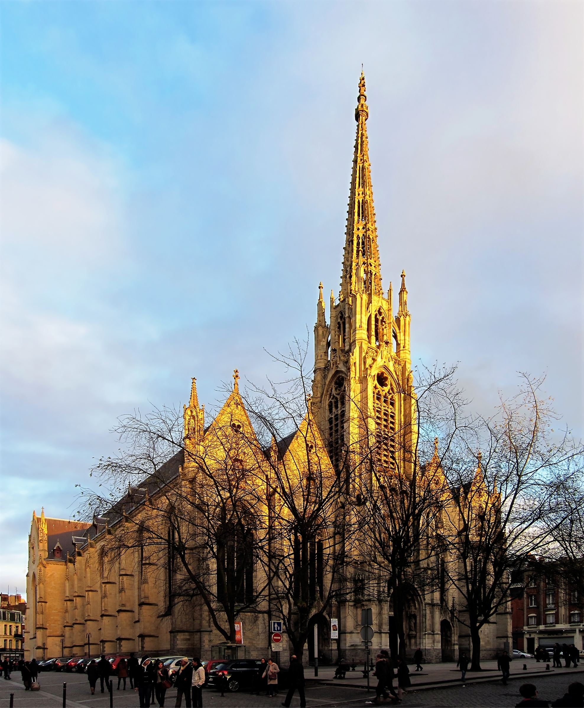 L'église saint Maurice de Lille.